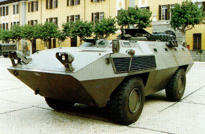 Carro armato Italiano Tipo 6614. Foto proveniente dal sito Sito Ufficiale dell'Esercito Italiano, Autorizzazione.